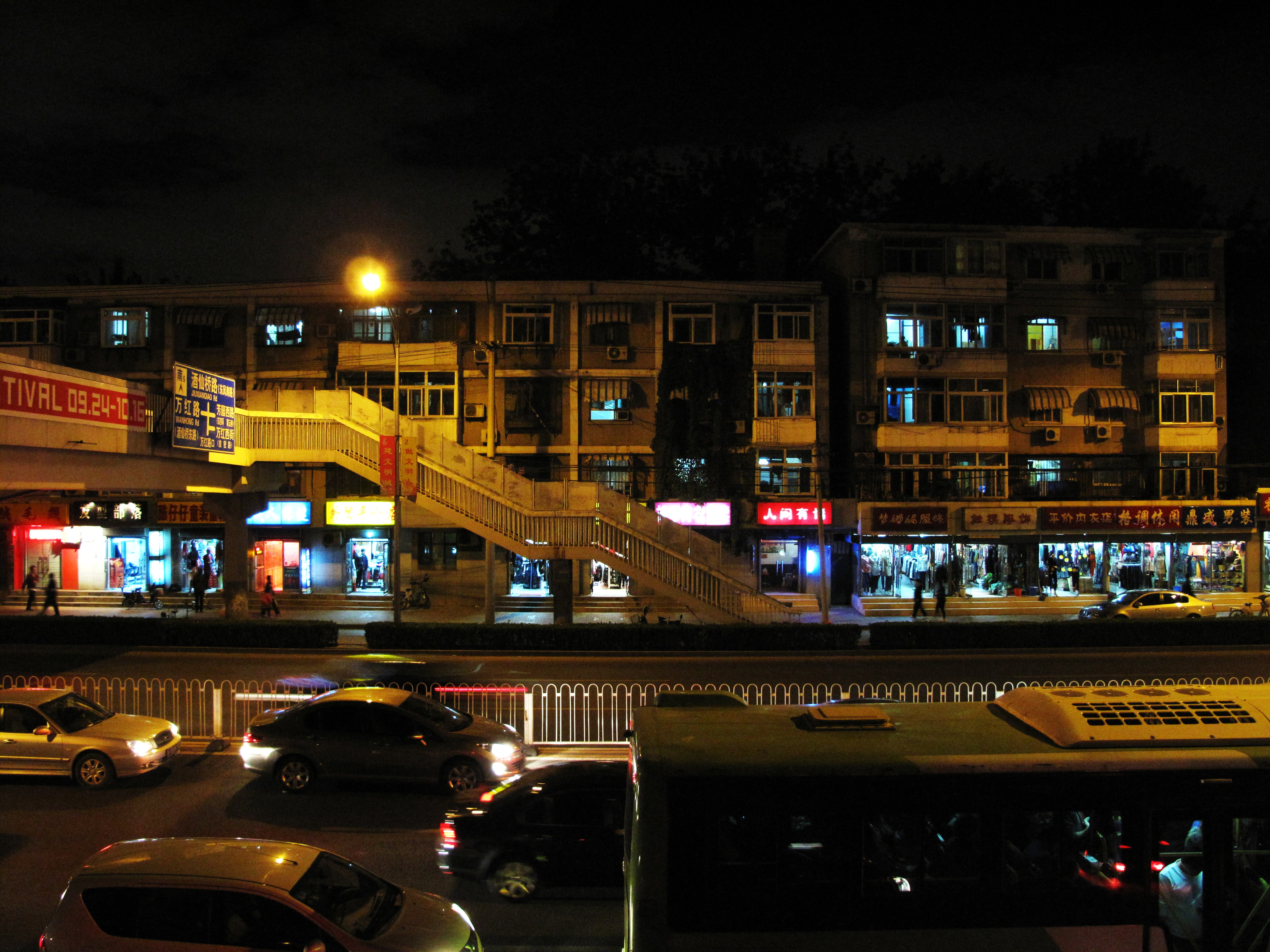 Avenue at night